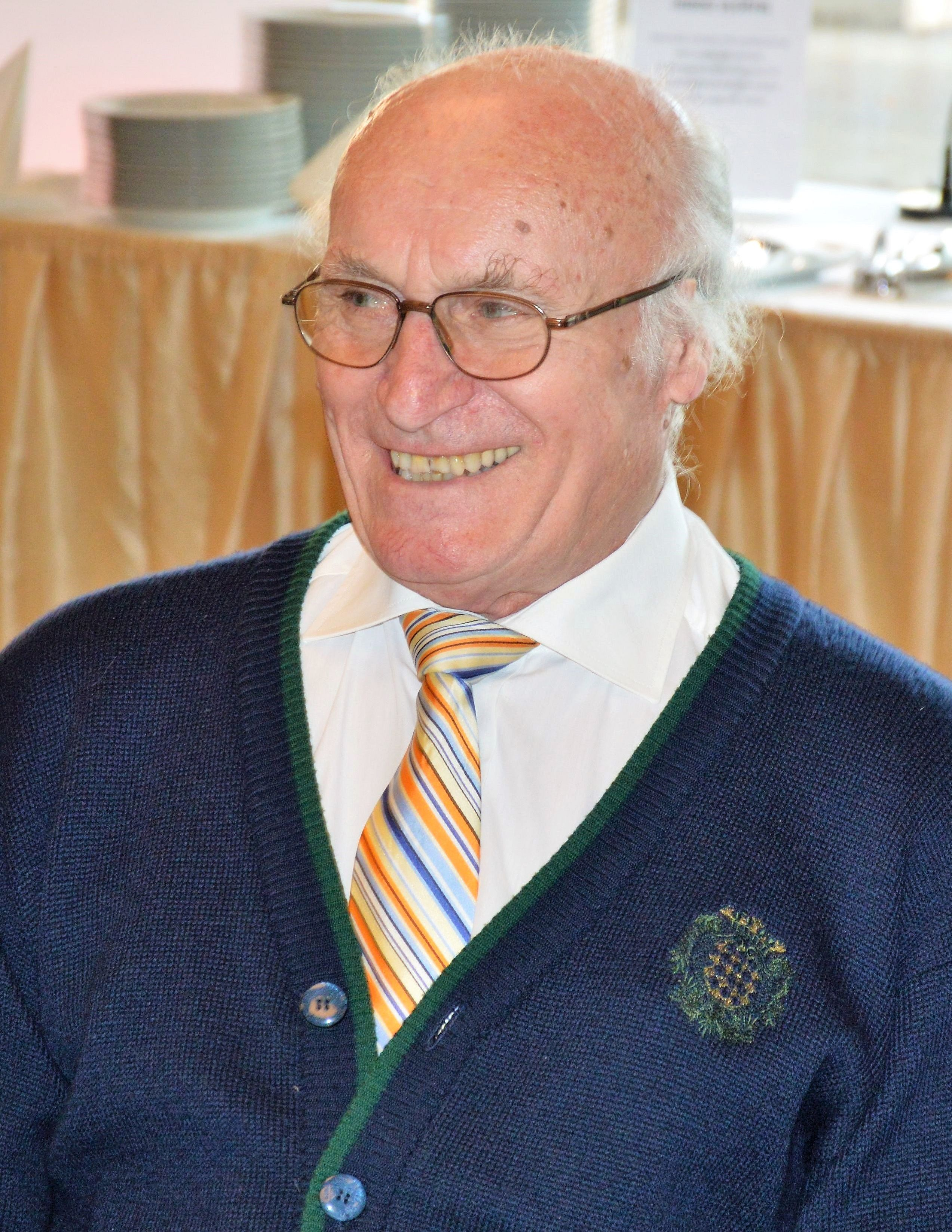 Kulcsár Gergely olimpiai ezüst- és bronzérmes gerelyhajító, edző